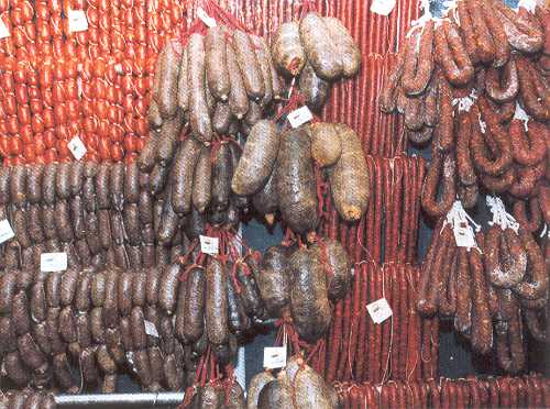 Embutidos de Requena.